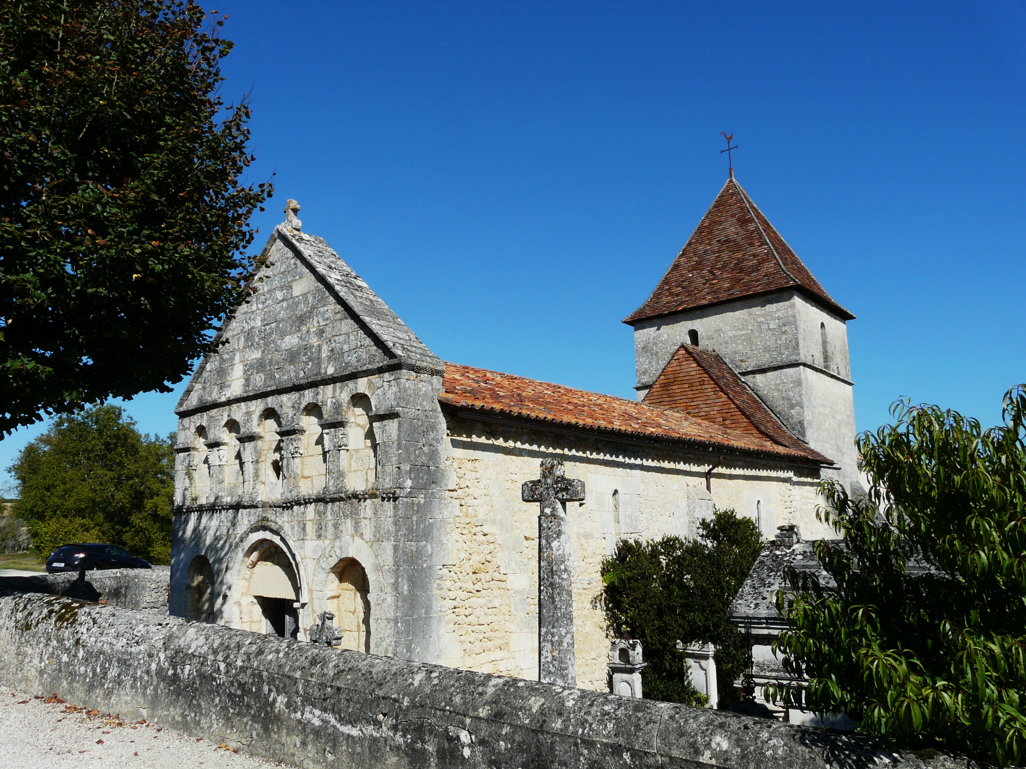 L'église de Boulouneix vue depuis le sud-ouest, La Gonterie-Boulouneix, Dordogne, France